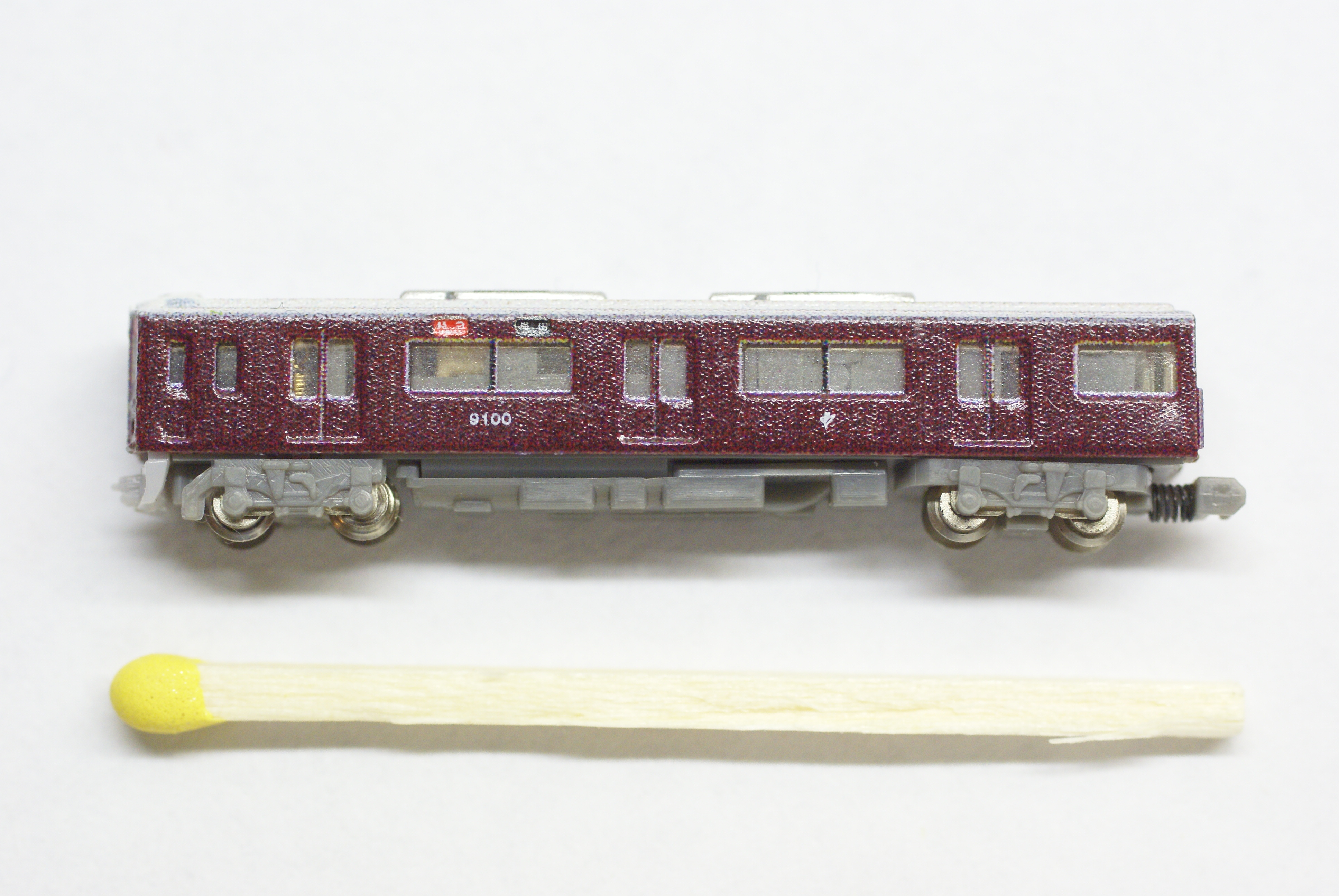 Triebwagen des Hankyu 9000 Zuges des japanischen Herstellers KK Eishindo für die Modellbahnspurweite T